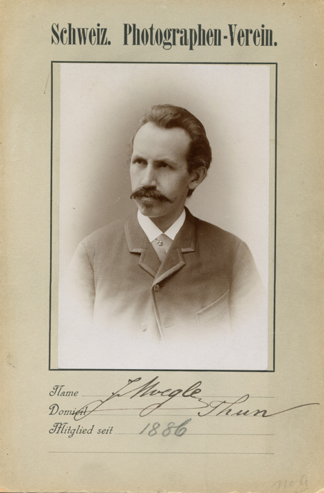 Jean Moégle (1853-1938), Fotograf, Einzelporträt aus der Porträtserie des Schweizer Photographen Vereins 1894-1940